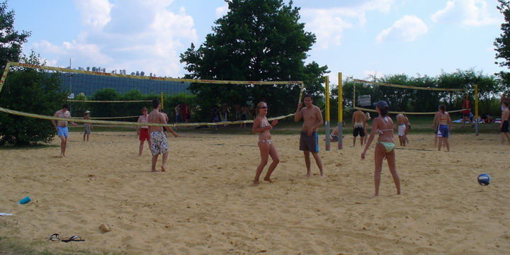 Beachvolleyball-Felder am Seepark Niederweimar.